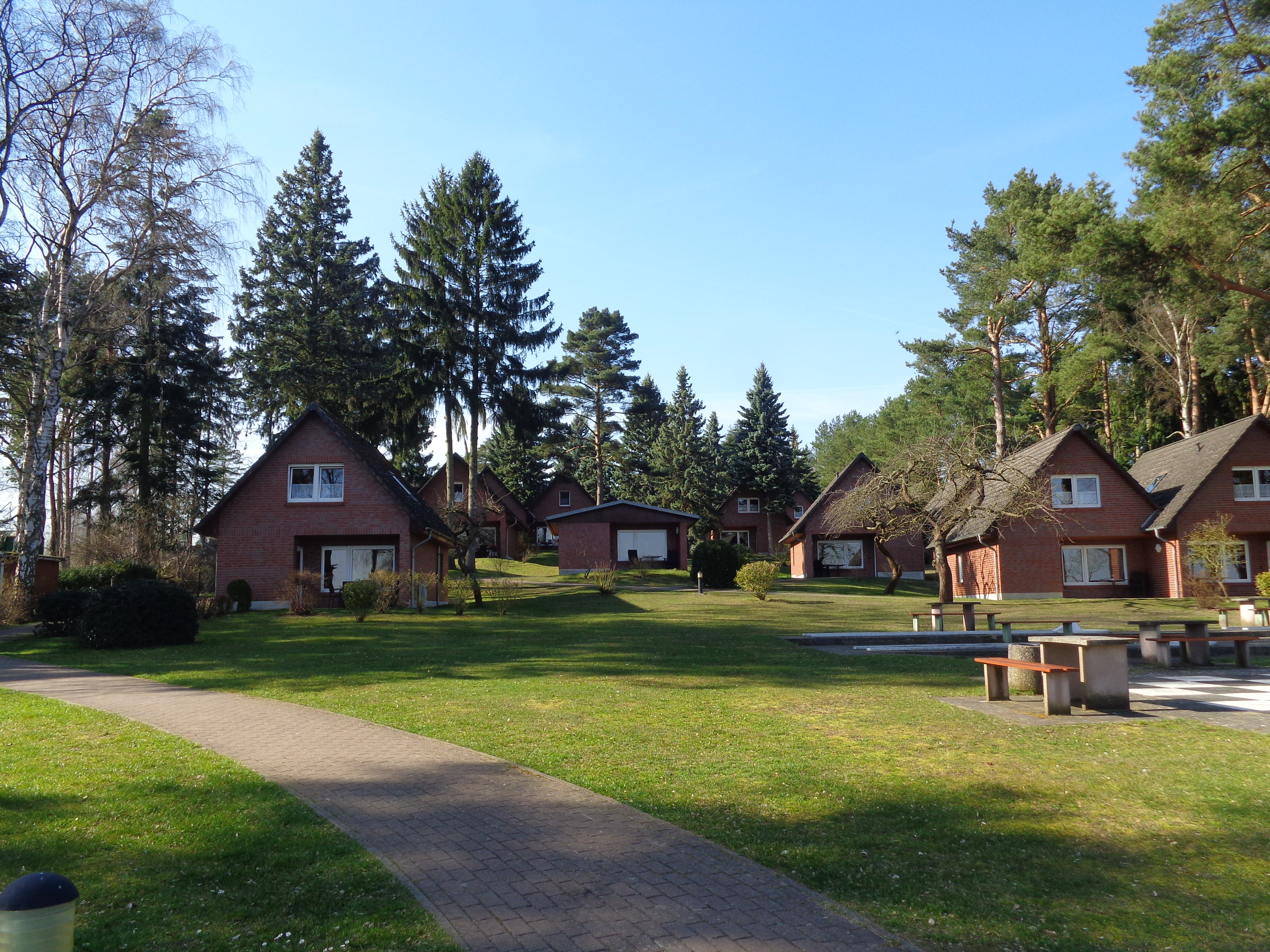 Ferienhäuser am Plauer See, Heidenholz, Plau am See